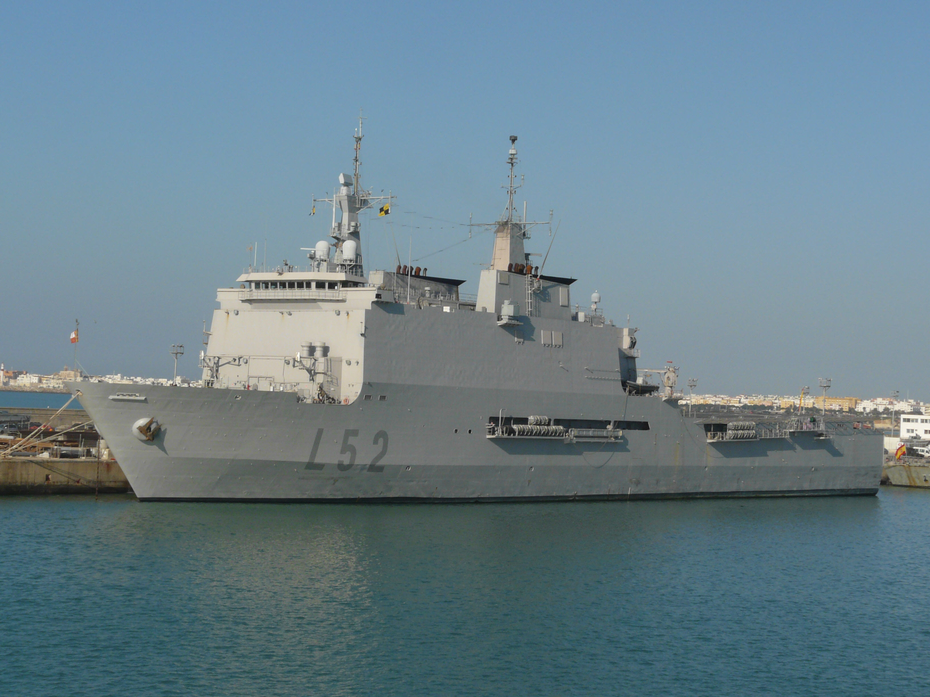 El buque LPD Castilla (L-52) de la Clase Galicia en la base naval de Rota. Cadiz.